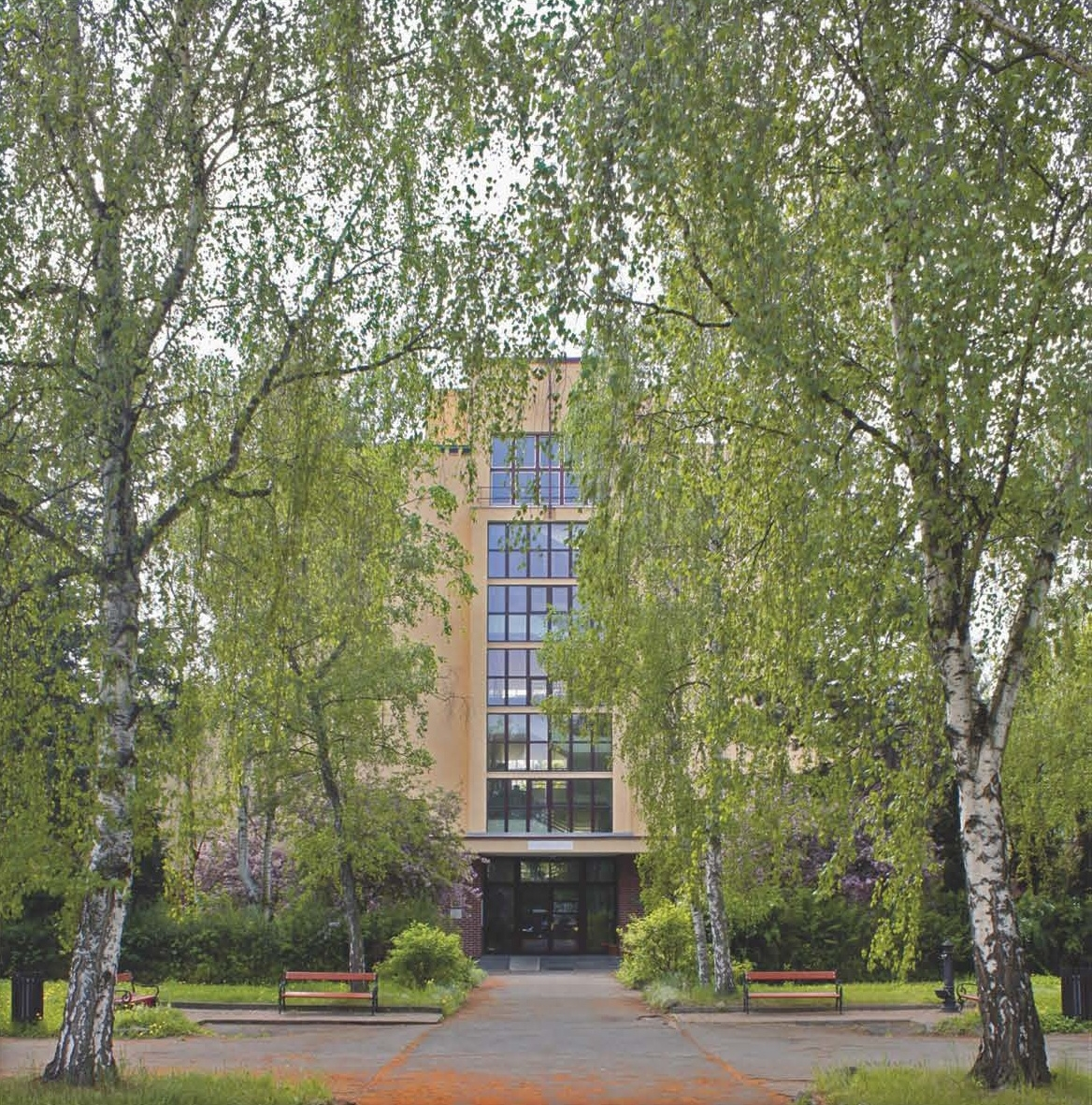 Fotografie vchodu do Husitské teologické fakulty Univerzity Karlovy